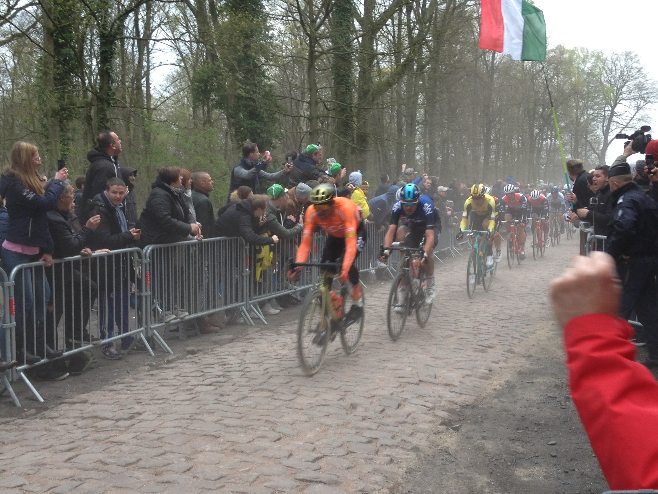 Doorkomst in het Bos van Wallers-Arenberg van Parijs-Roubaix 2019. Greg Van Avermaet leidt het peloton.